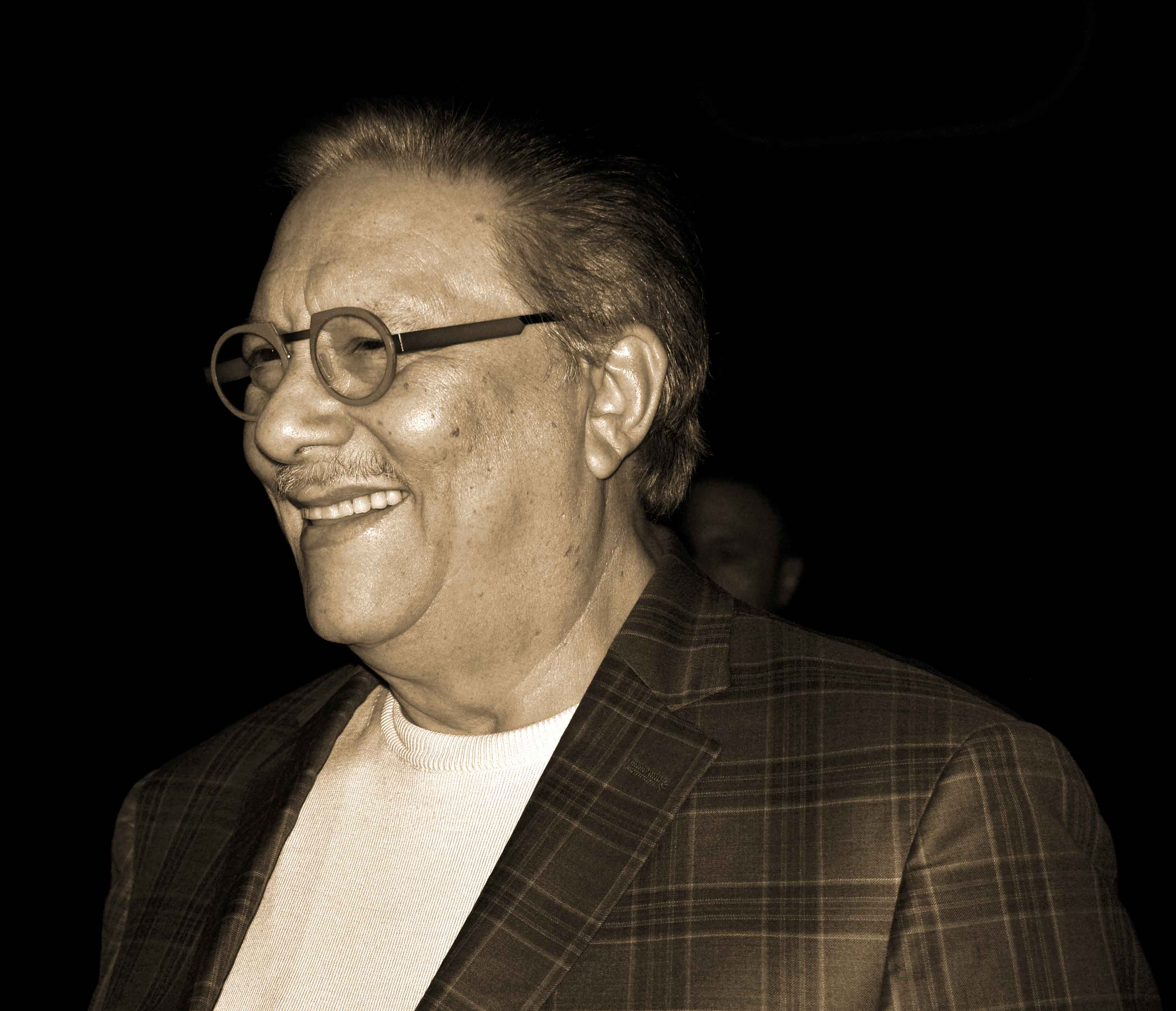 Вечер джаза Артуро Сандоваль и его бенд